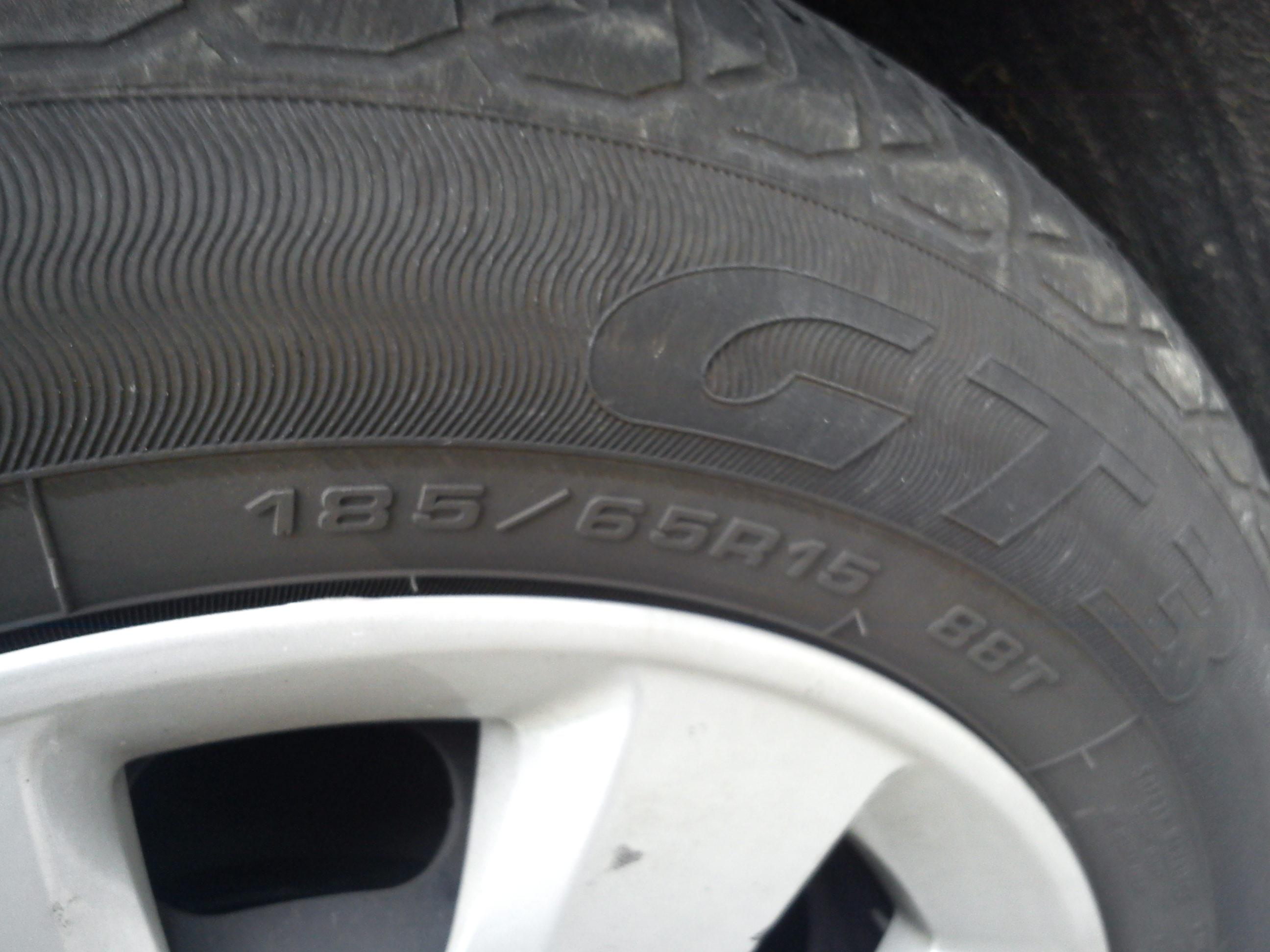 Détail des caractéristiques d'un pneumatique Michelin Energy Saver: 185/65R15 88T